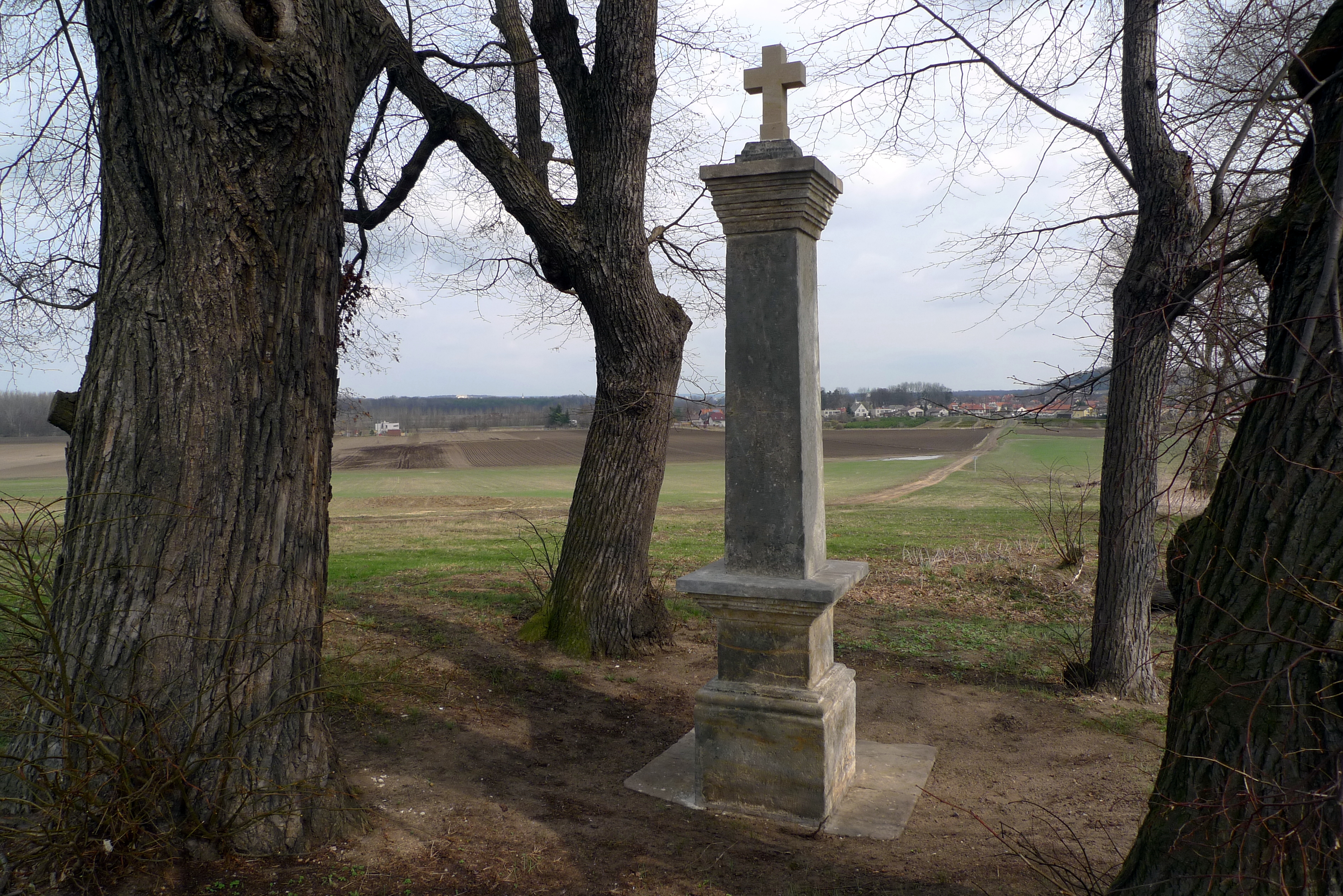 Památné lípy a boží muka po rekonstukci v Přerově nad Labem v lokalitě Na Vrších.